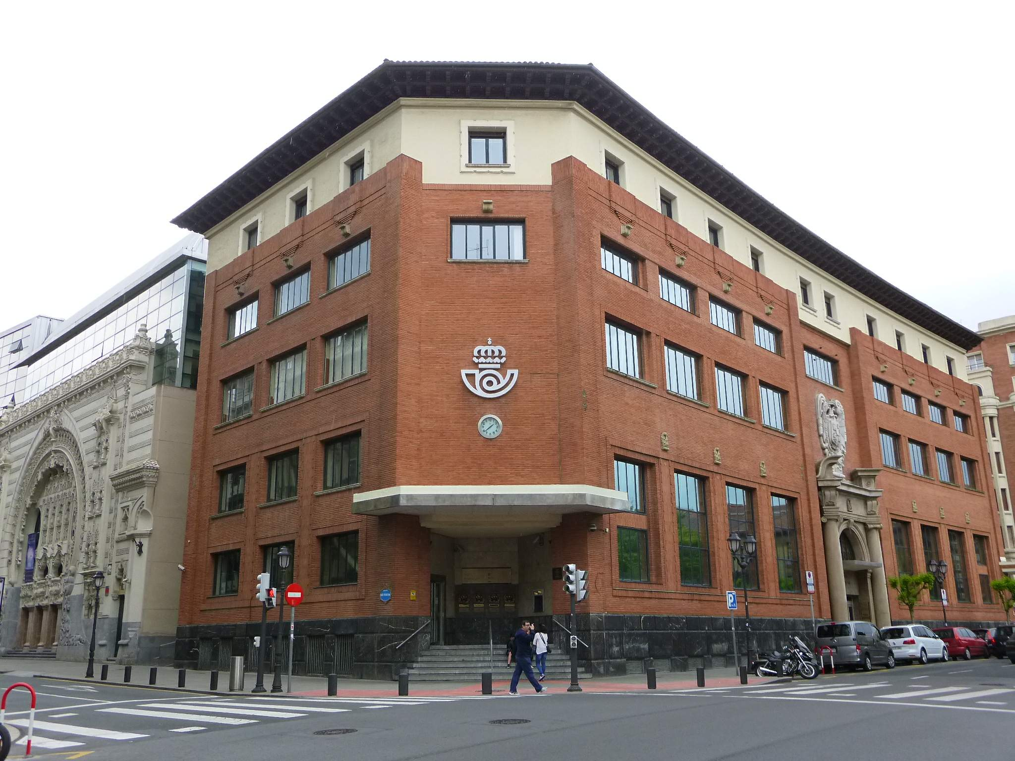 Edificio de Correos y Telégrafos (Bilbao)